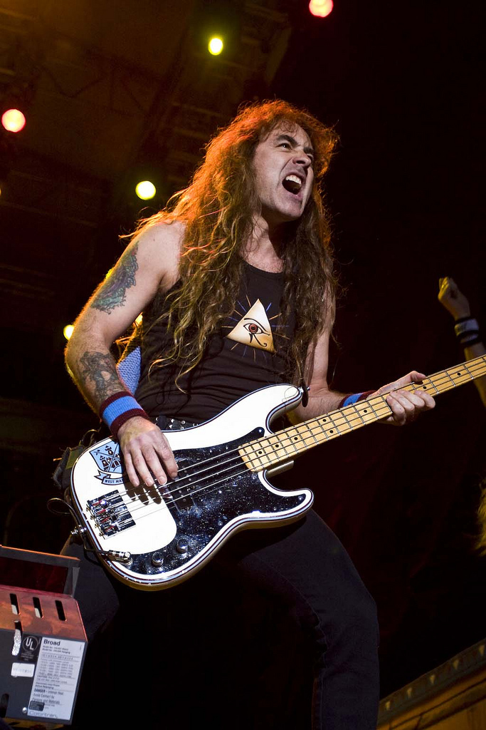 Steve Harris In concerto con gli Iron Maiden in Costa Rica